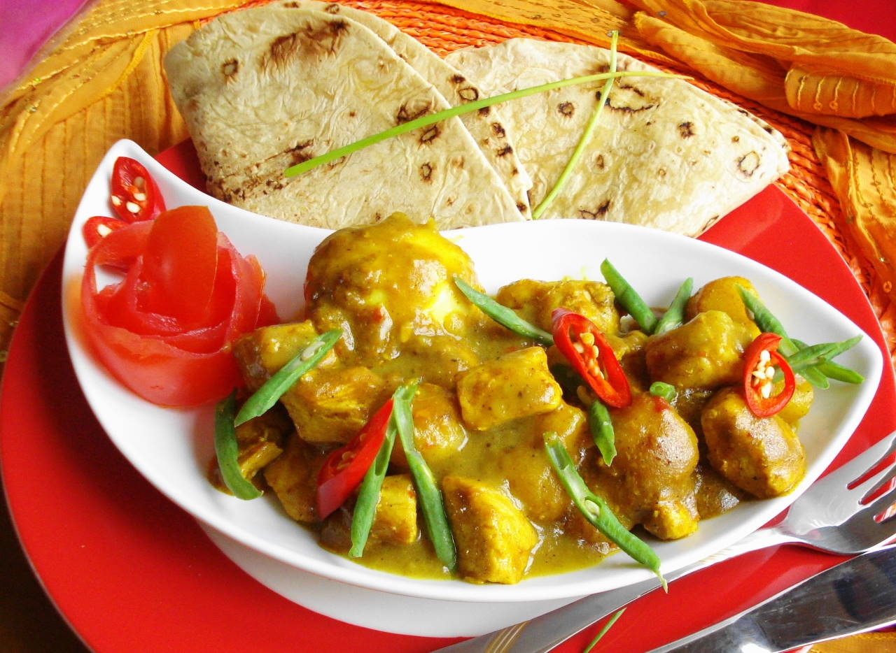 Roti Masala Trafasie (ook wel kip masala genoemd) is het populairst bijgerecht voor roti, bestaande uit kip in Hindoestaanse masala saus met verse groenten en ei.